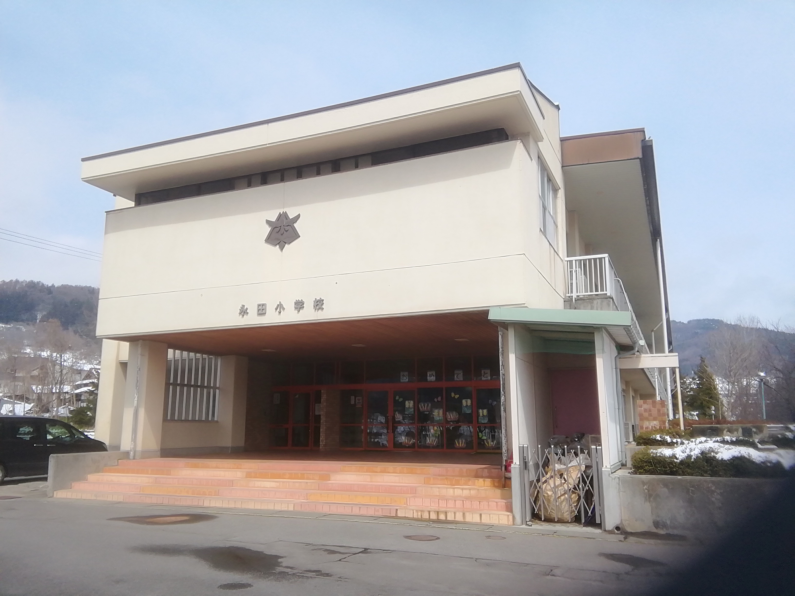 中野市立永田小学校（2020-3-30）